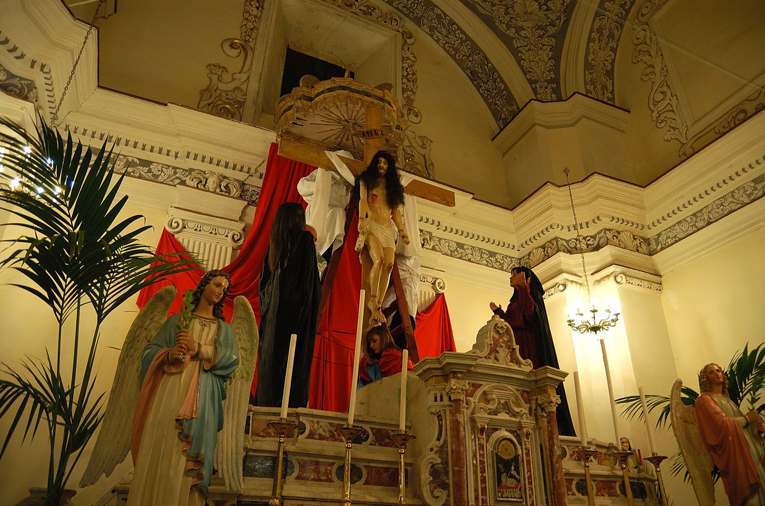 Aidone, EN_sicilia, Venerdì Santo: a Scisa a Cruc' (la Deposizione dalla Croce)